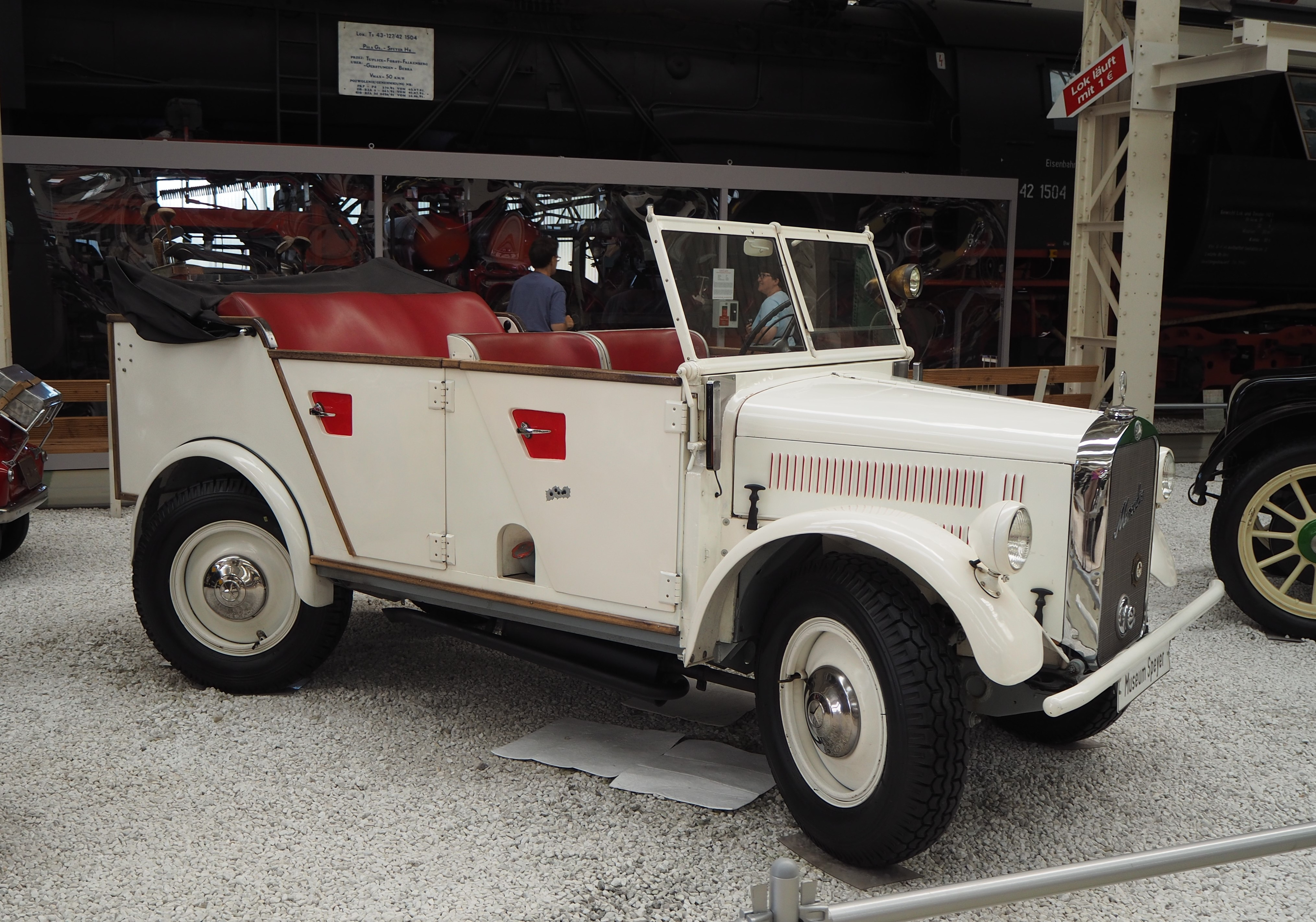 1938 Mercedes-Benz G5